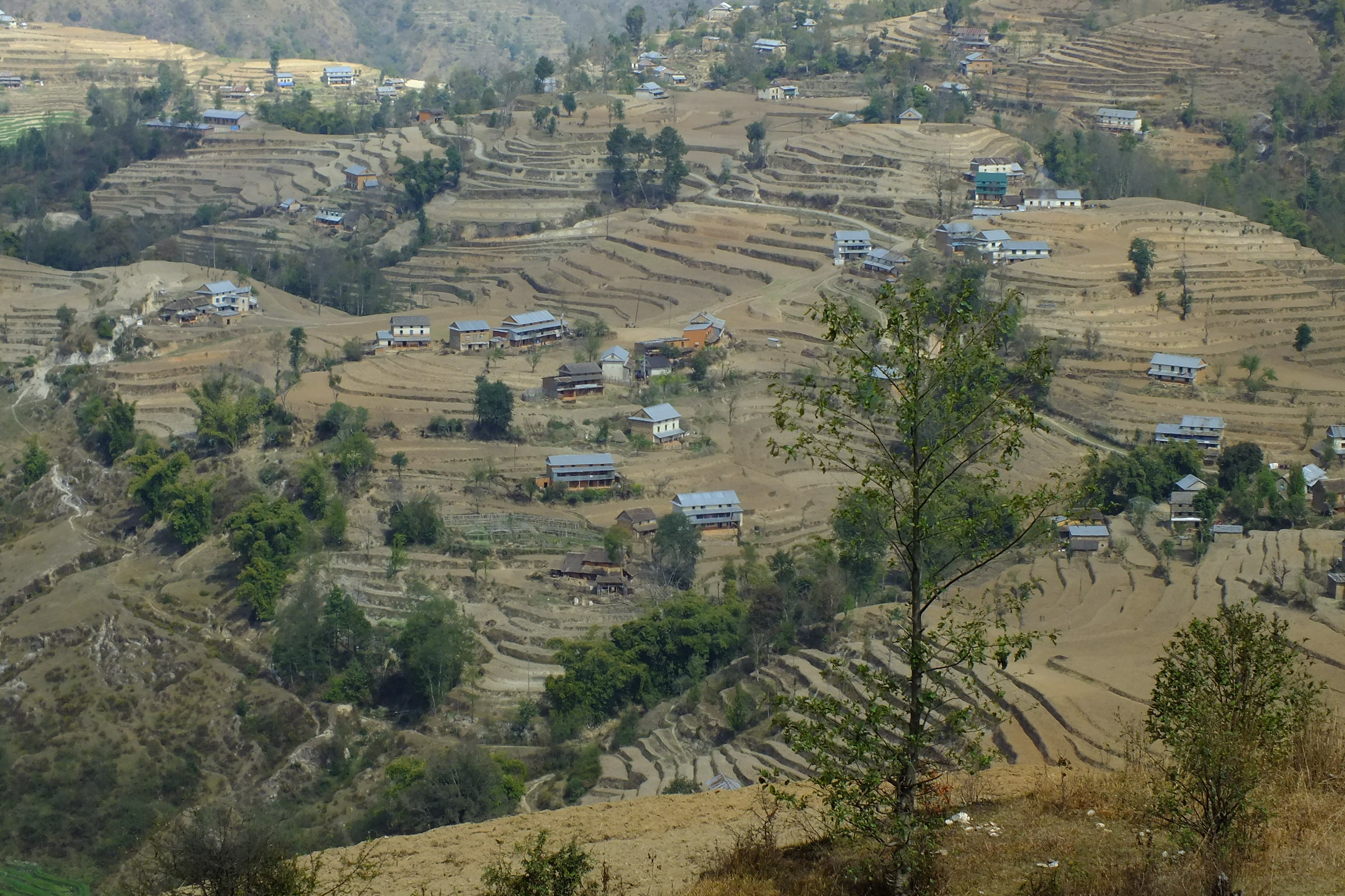 2015-03-18 Nagarkot